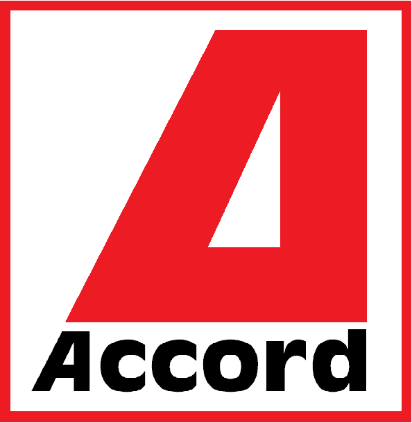 Zeichen vom Accord Markt